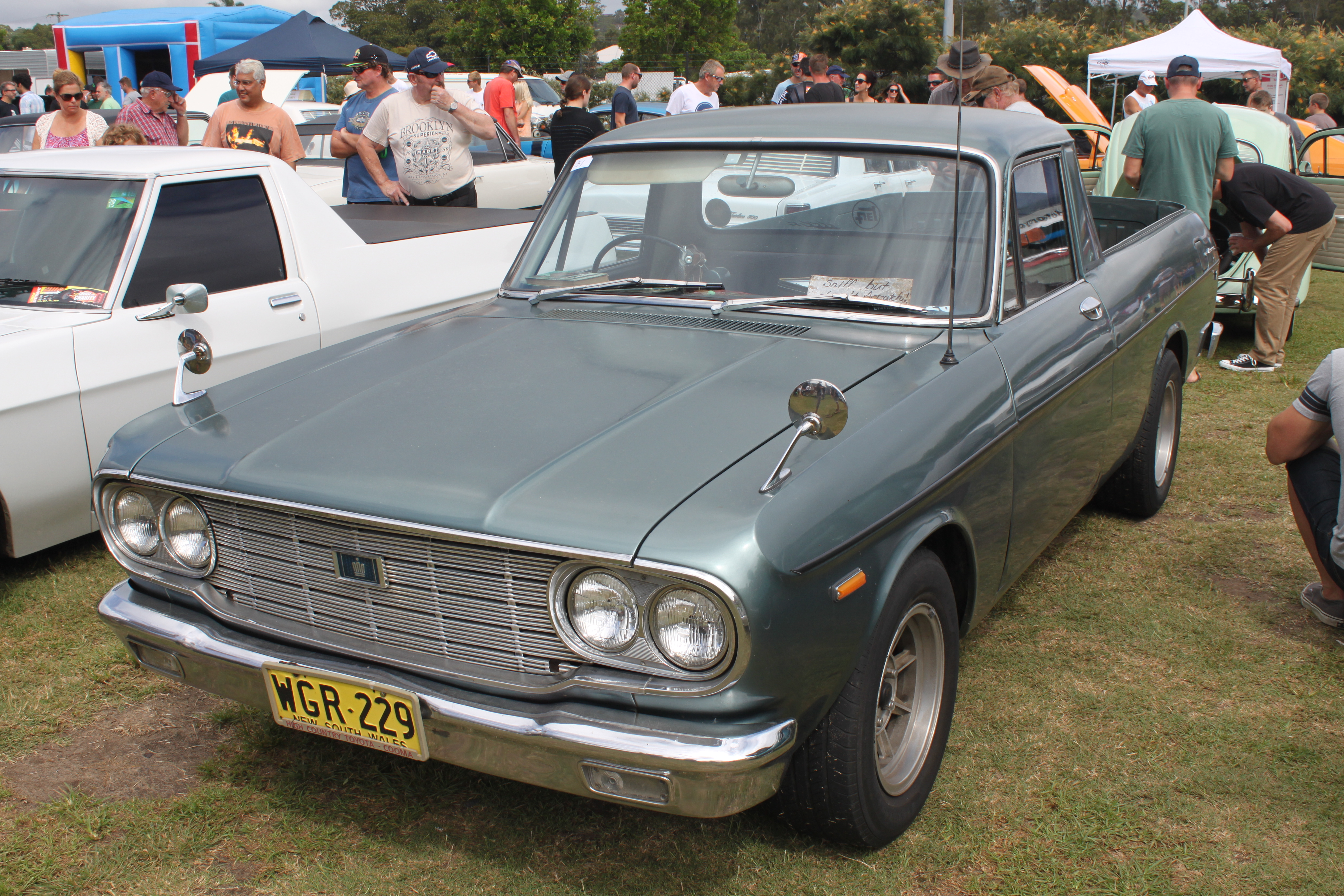 Car & Bike Fest, Pittwater Rugby Park 2015